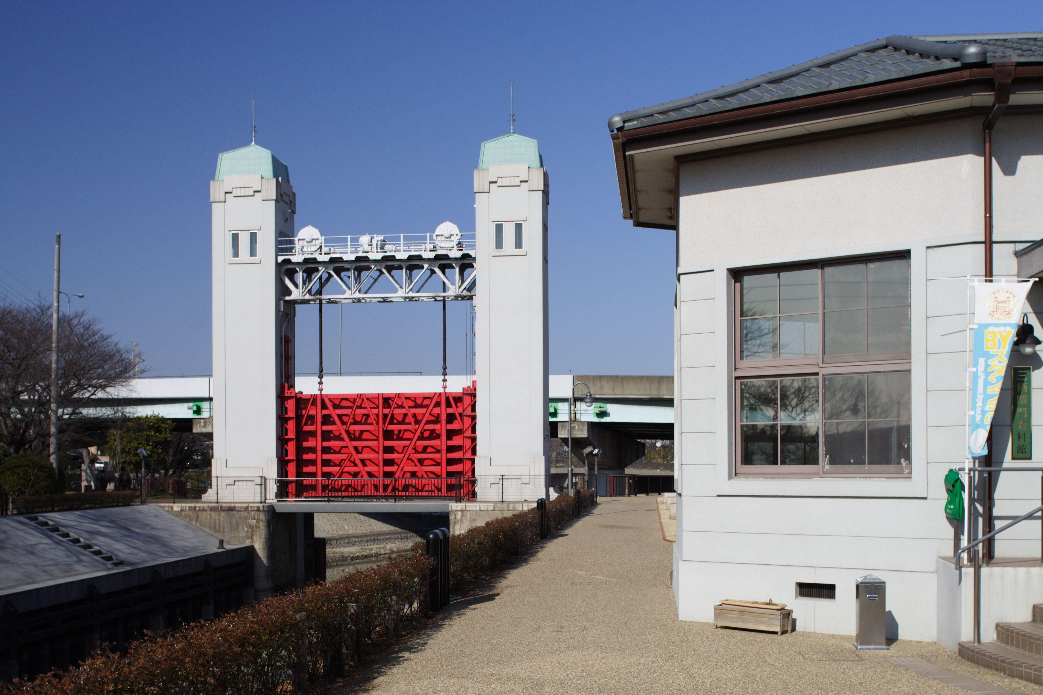 京都・三栖閘門/Misulocks Kyoto Japan